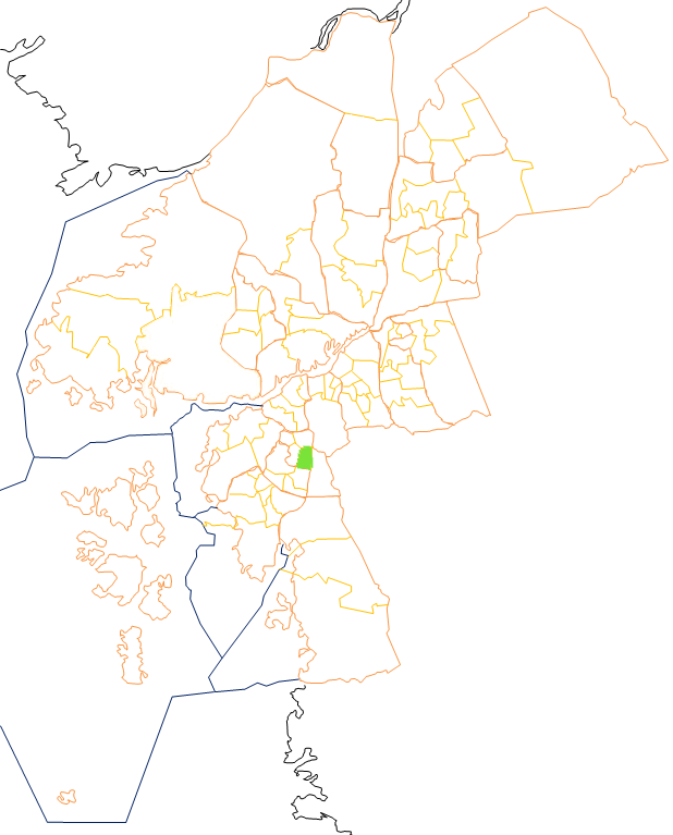 Karta som visar primärområdes belägenhet i Göteborg